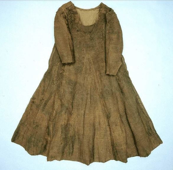 Robe médiévale mise en évidence dans l'aître attenant à l'église nordique d'Herjolfsnes (site archéologique Ø111). Pièce datée aux environs de 1400. Conservée au musée national du Danemark.